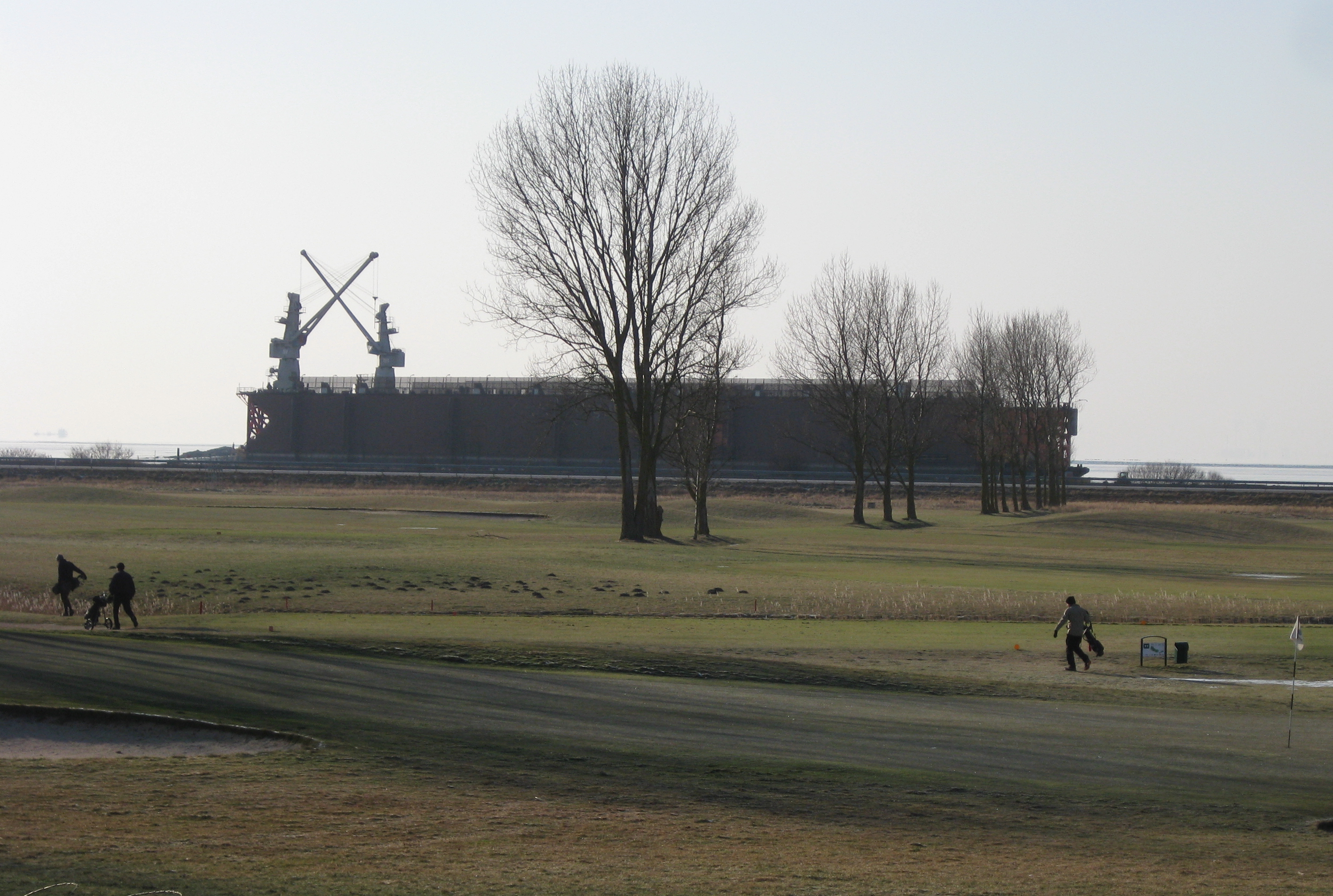 Öresundsvarvets torrdocka hamnade vid Öresunds golfklubb i Hofterup efter Adventsstormen 2011.